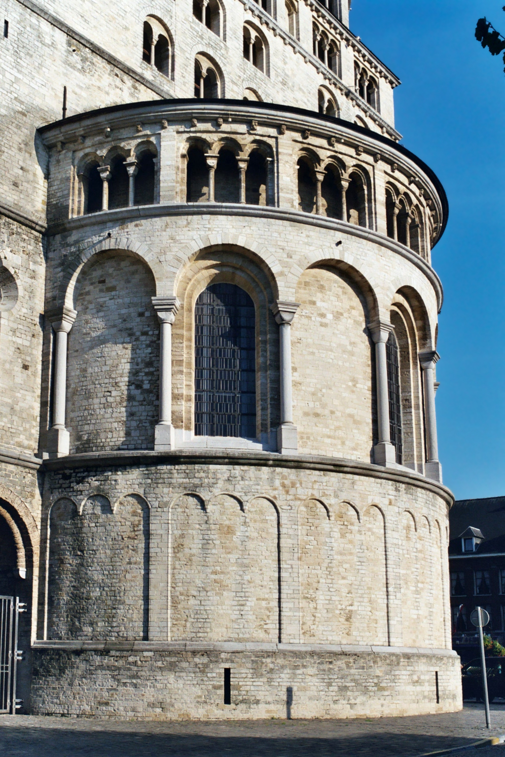 Belgique - Brabant wallon - Nivelles - Collégiale Sainte-Gertrude